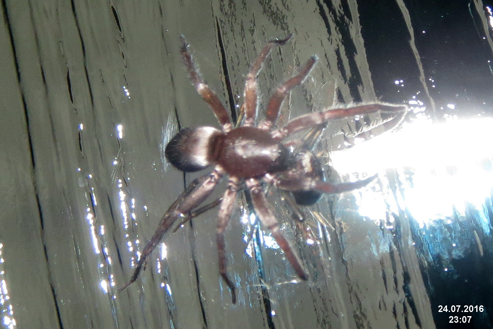 Scotophaeus blackwalli - skálovka Blackwallova.